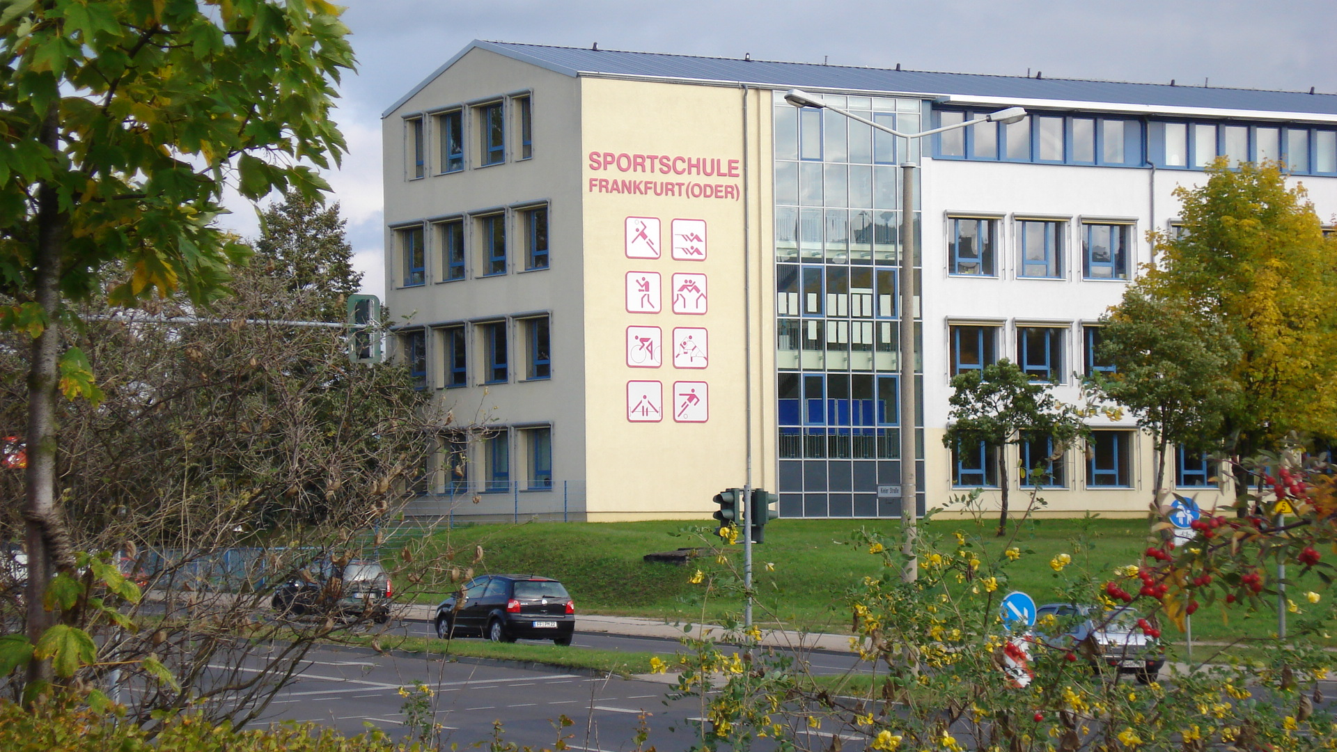 Sport school in Frankfurt (Oder), Brandenburg, Germany